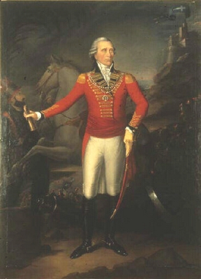 Portrait du général de Boigne (1751-1830) après la bataille de Patan.